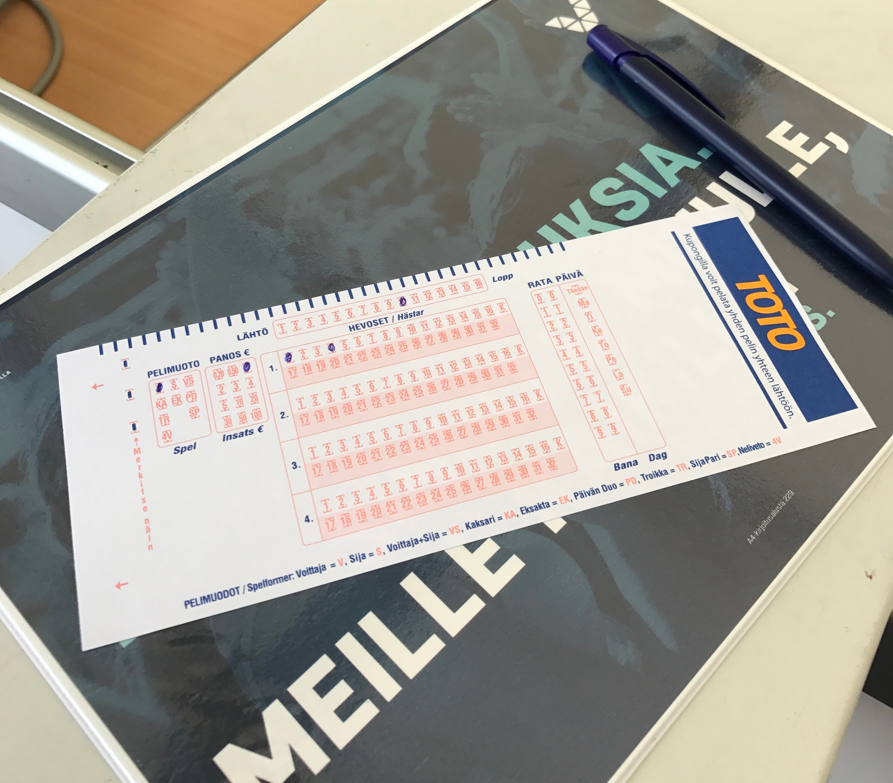 Toto-pelin kuponki, jolla pelataan ravikilpailujen tuloksista.